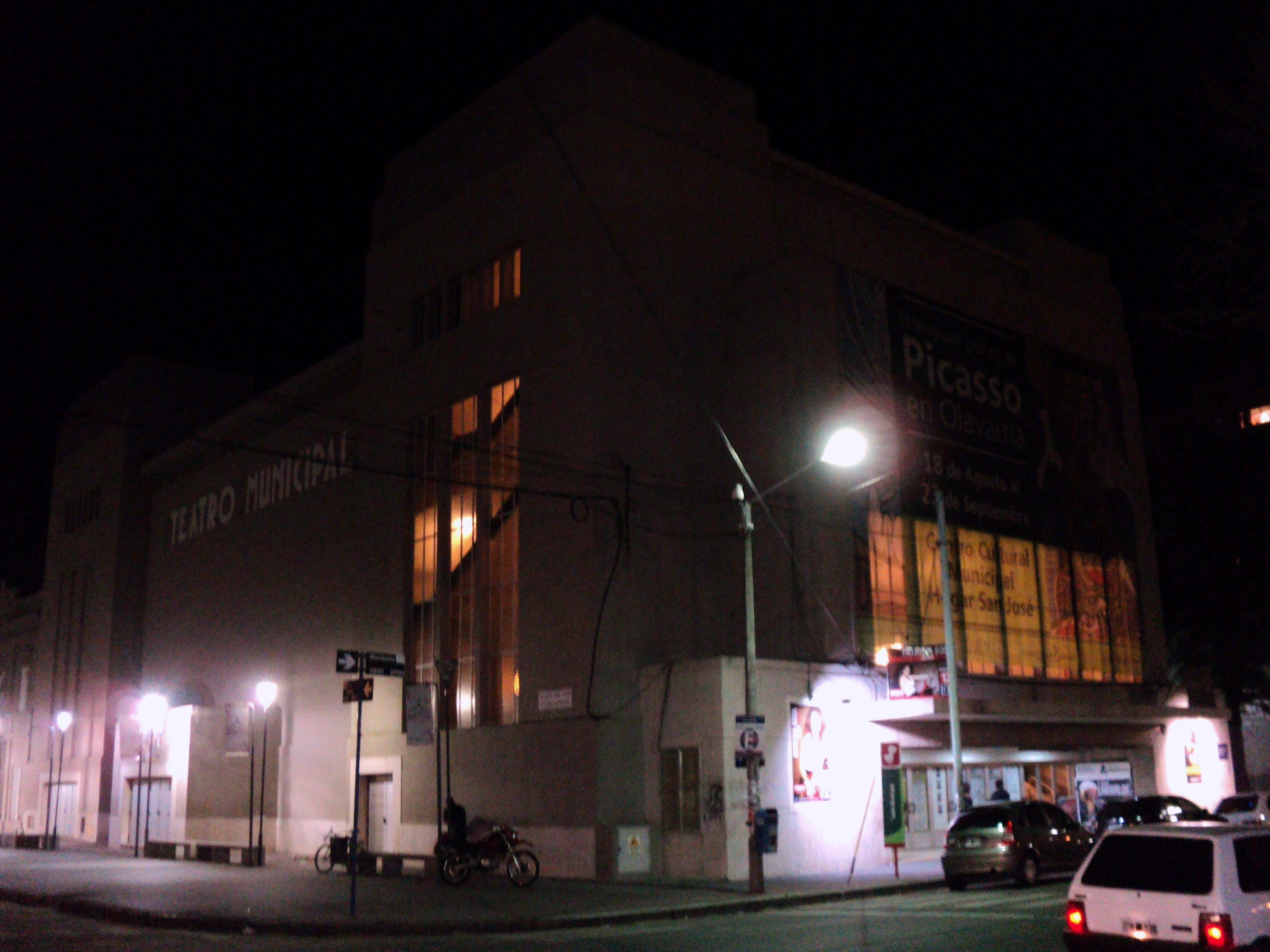 teatro municipal de considerables dimensiones